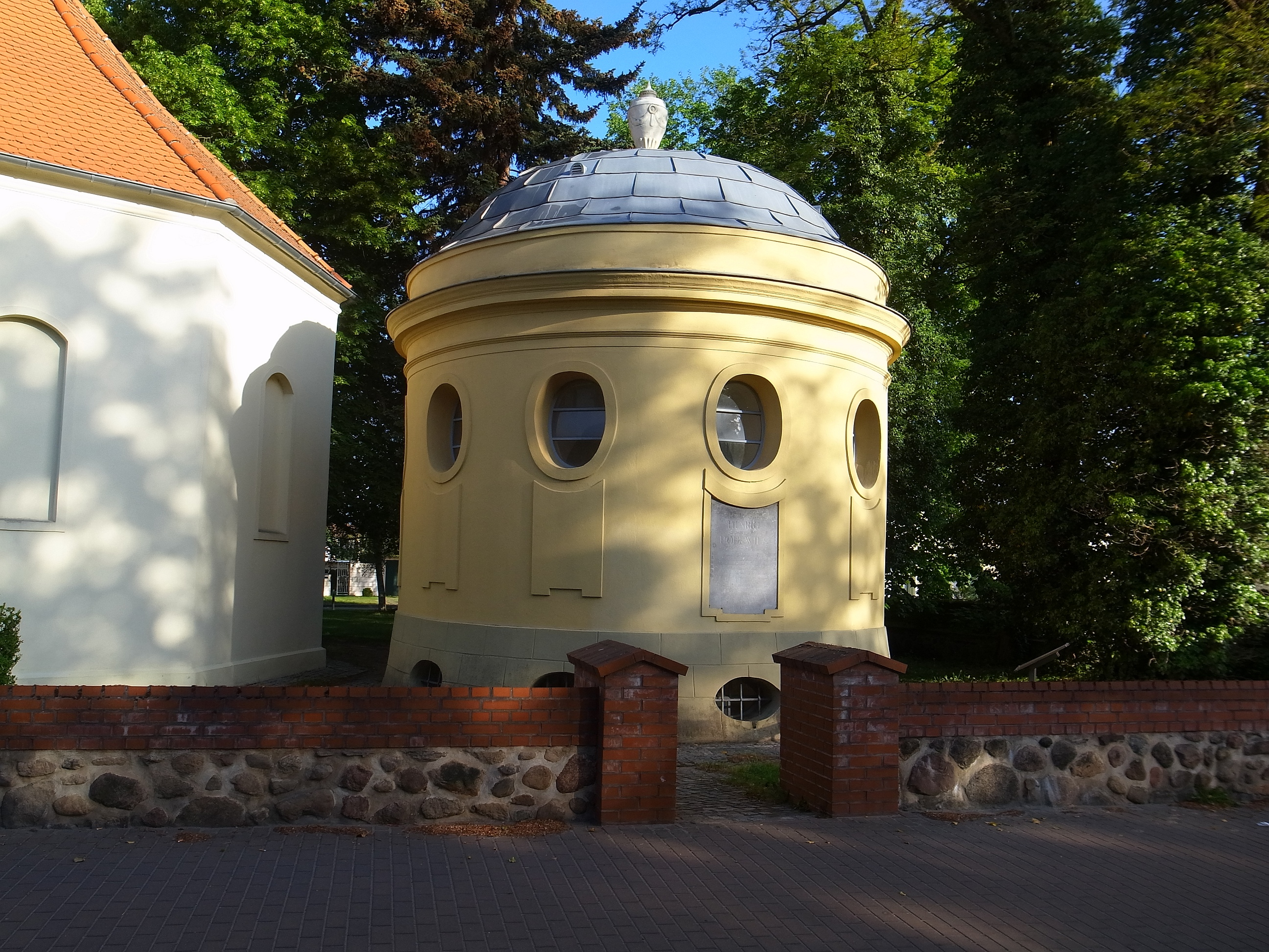 Fredersdorf-Vogelsdorf, Gruftbau für Heinrich v. Podewils